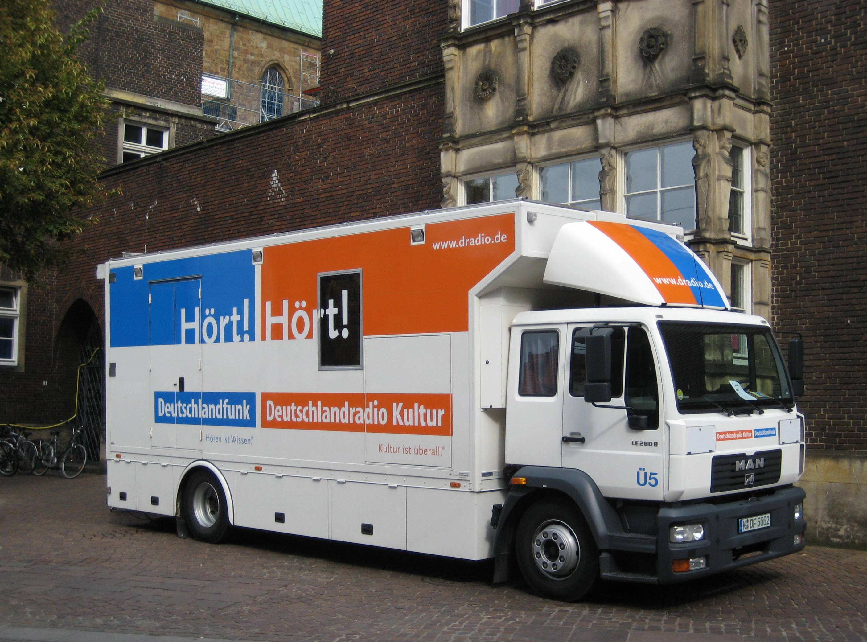 Übertragungswagen „Ü5“ für Hörfunkübertragungen des Deutschlandradios (Programme: Deutschlandfunk (DLF), Deutschlandradio Kultur (DKultur)); hier vor dem Konzerthaus Die Glocke in Bremen, Deutschland